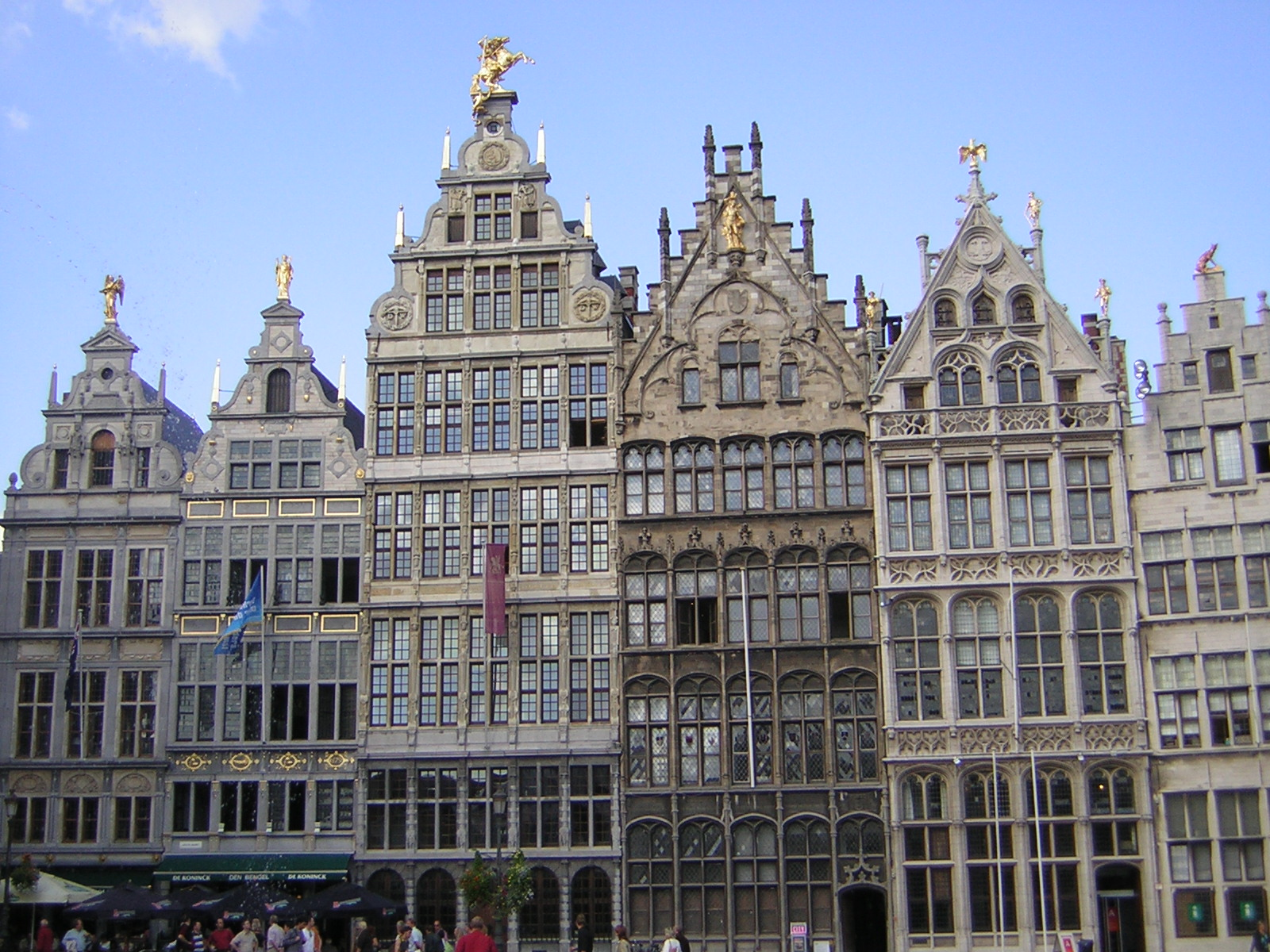 Gildehuizen aan de Grote Markt in Antwerpen.